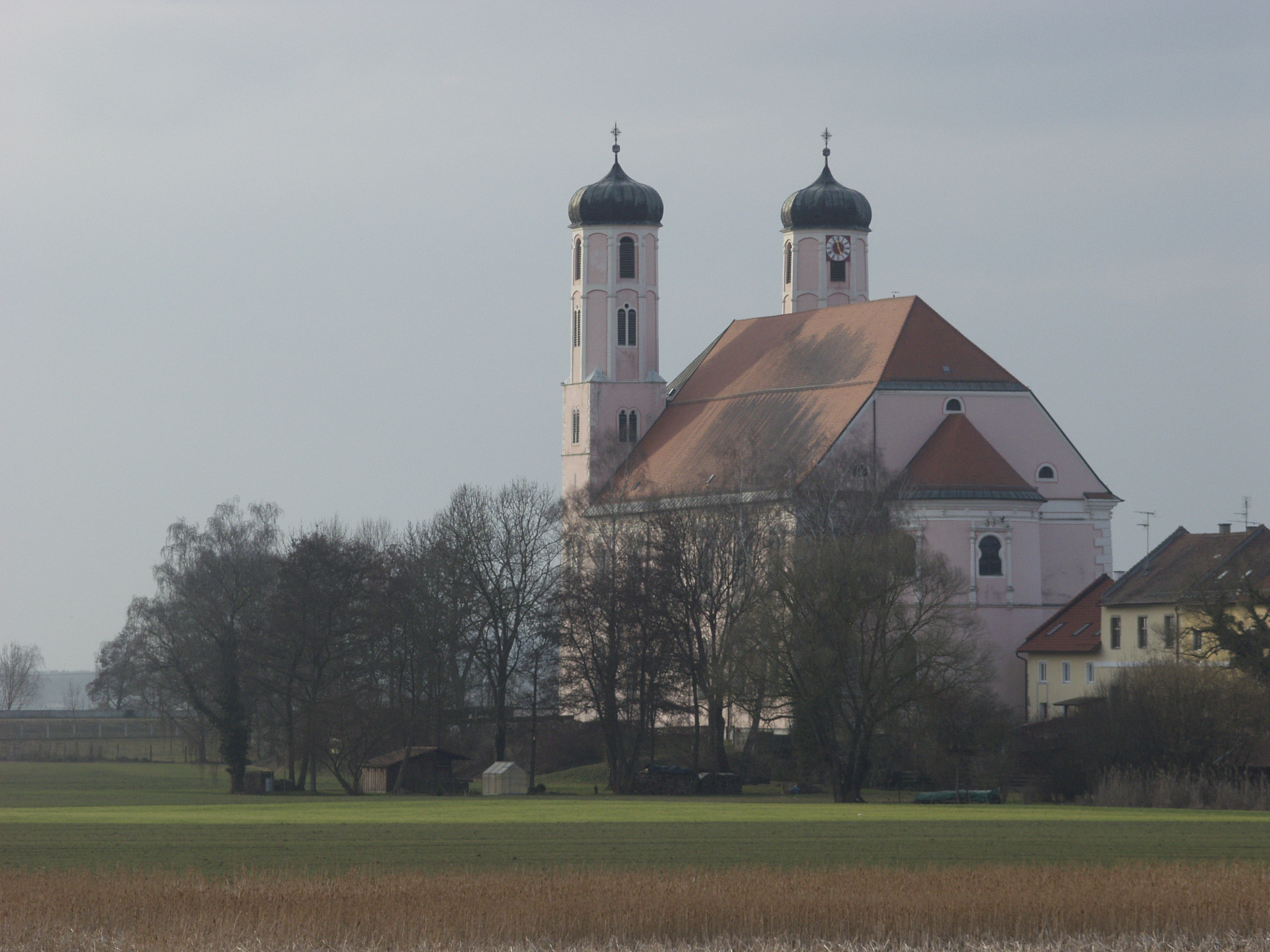 Kloster Oberalteich Object location48° 55′ 00.08″ N, 12° 40′ 00.95″ E